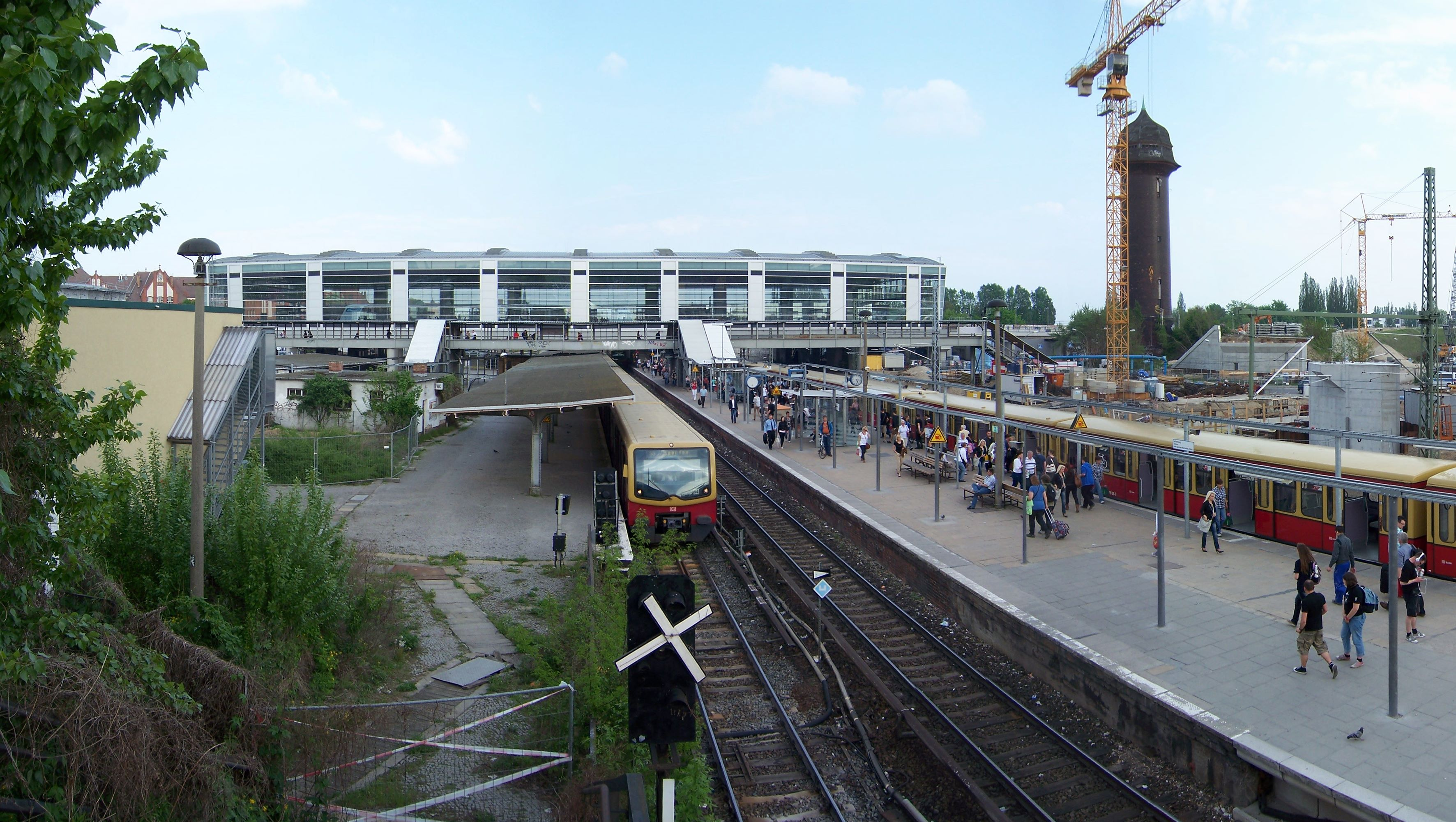 Baustelle Berlin Ostkreuz, Panorama, letzter Betriebstag Bahnsteig D